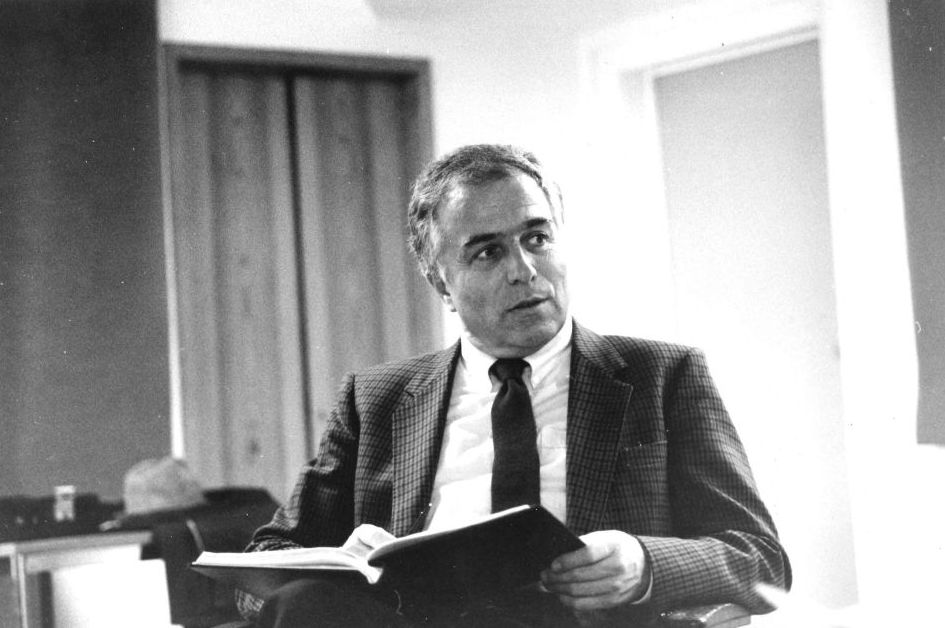 Der ehemalige SWF-Hörspielchef Hermann Naber in einer Aufnahme des Berliner Fotografen Werner Bethsold.